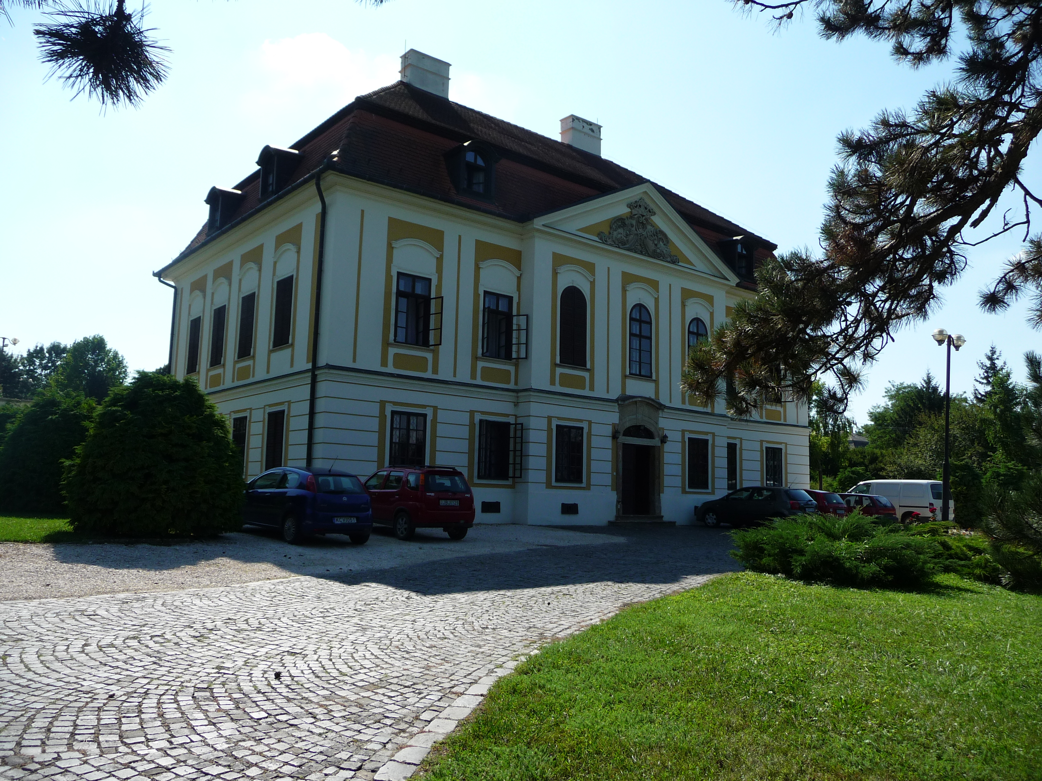 A Szentmiklóssy–Kubinyi-kastély északkeleti homlokzata (Erdőtarcsa)